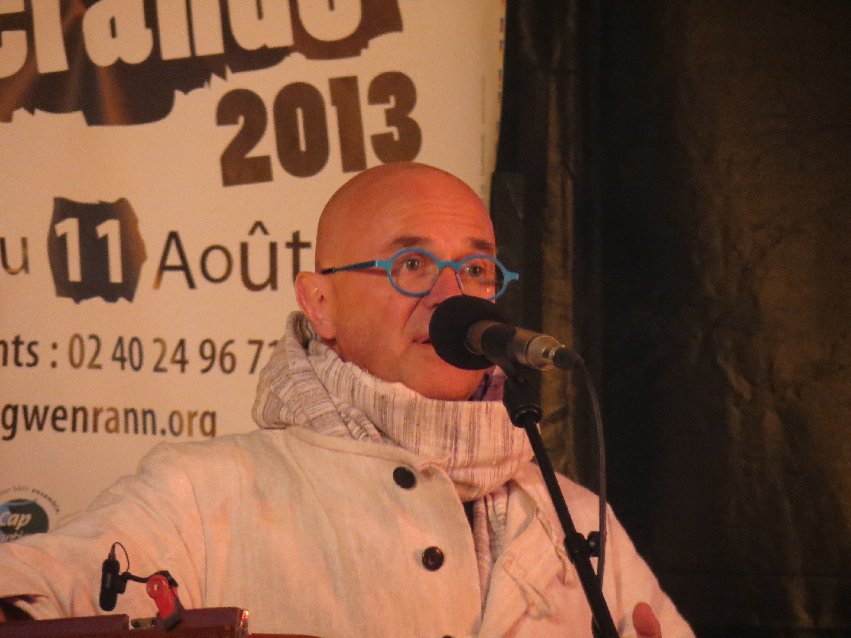 Yann-Fañch Kemener du groupe Barzaz dans le cadre des Festi'Cités de Guérande.